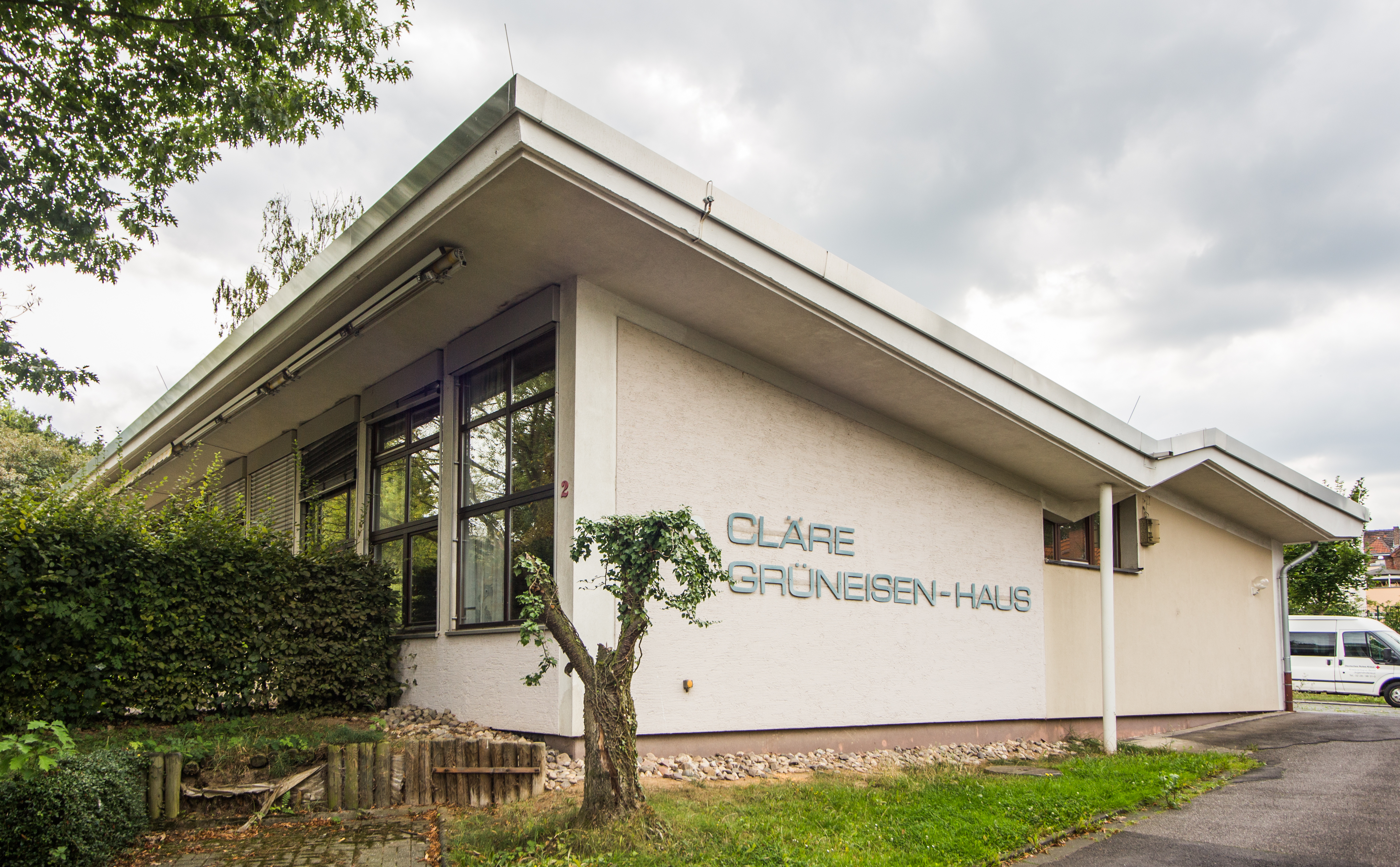 Ehemalige Volksschule Ippendorf, Am Kümpel 2, Bonn-Ippendorf: Blickrichtung Westen